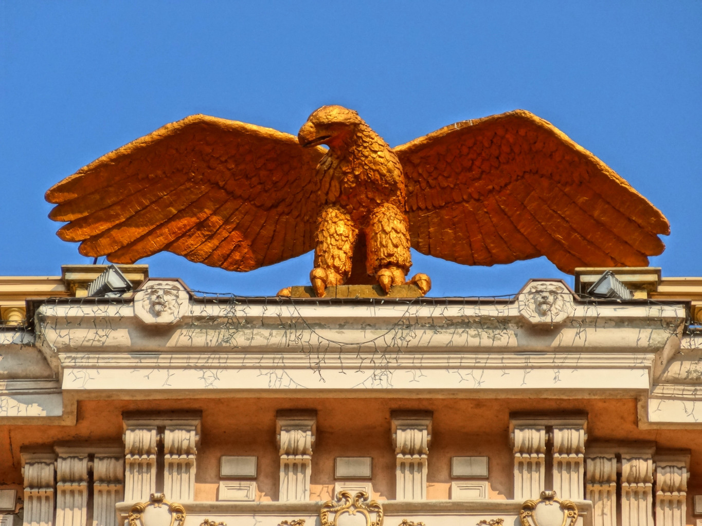 Hotel Pod Orłem w Bydgoszczy przy ul. Gdańskiej 14 (zbud. 1896, Józef Święcicki); na zdj. kamienny orzeł na dachu budynku